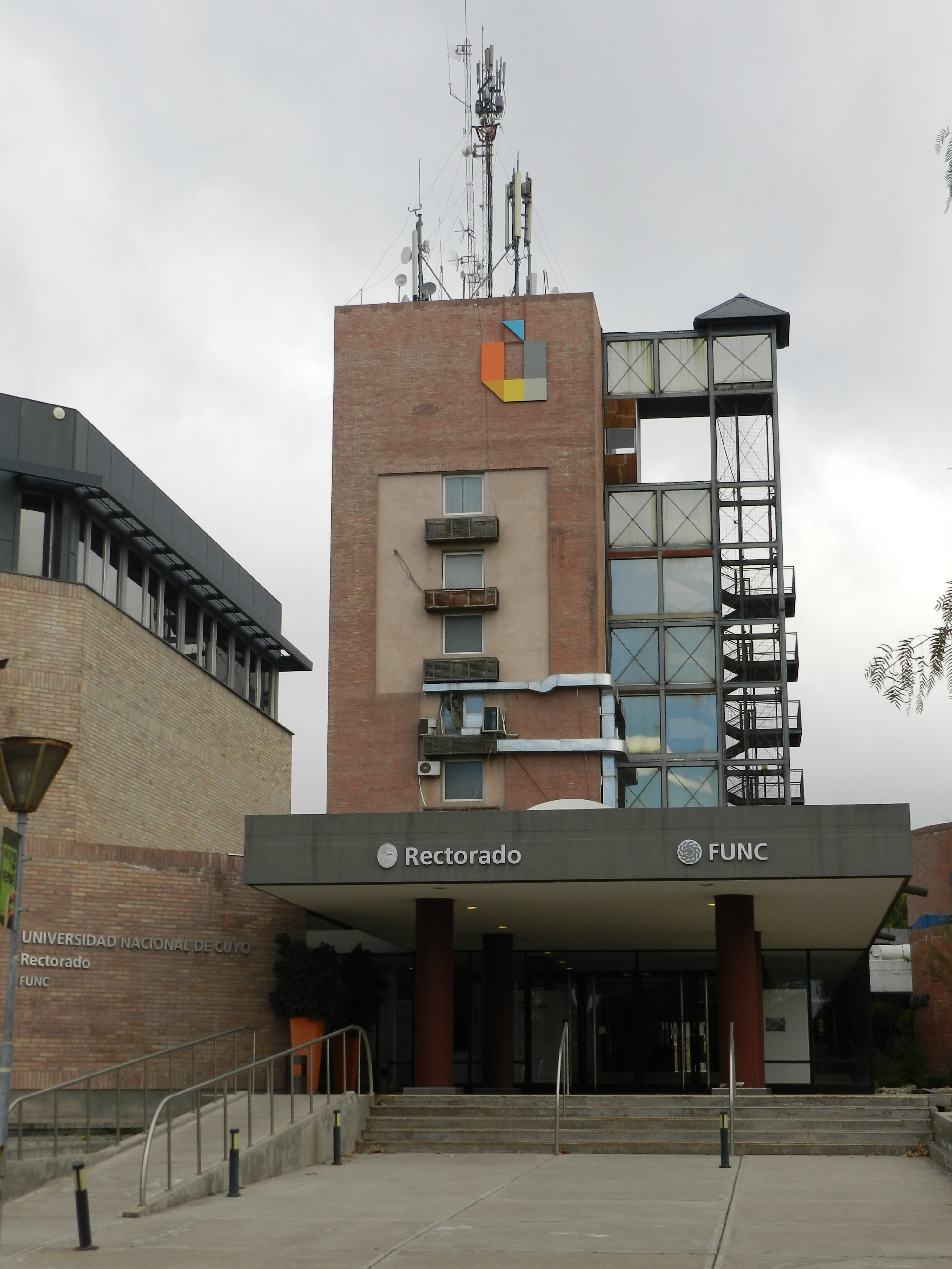 Torre de la Radio Universidad de la UNCuyo